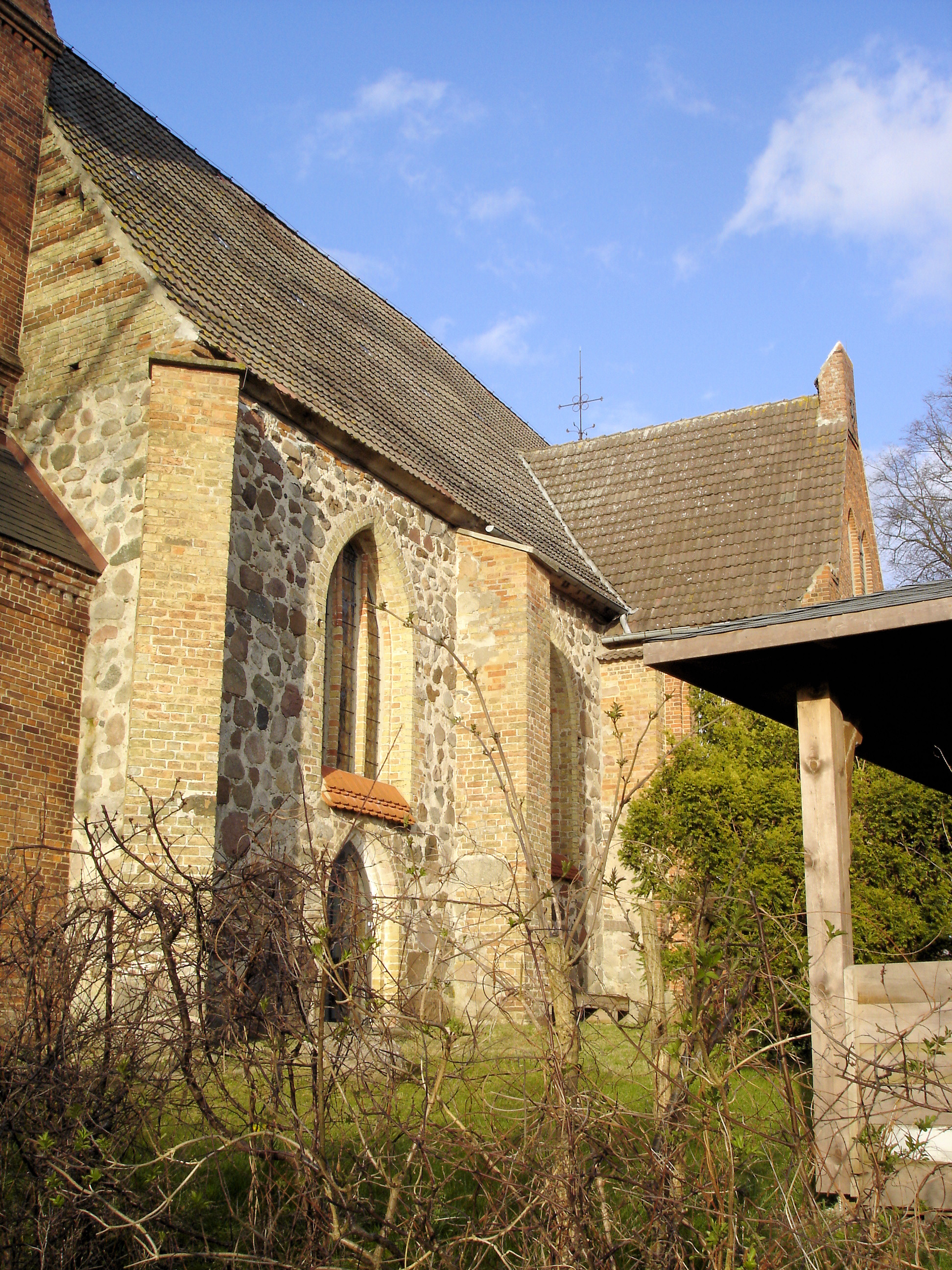 Kirche Volkenshagen, Detail / Church in Volkenshagen, detail